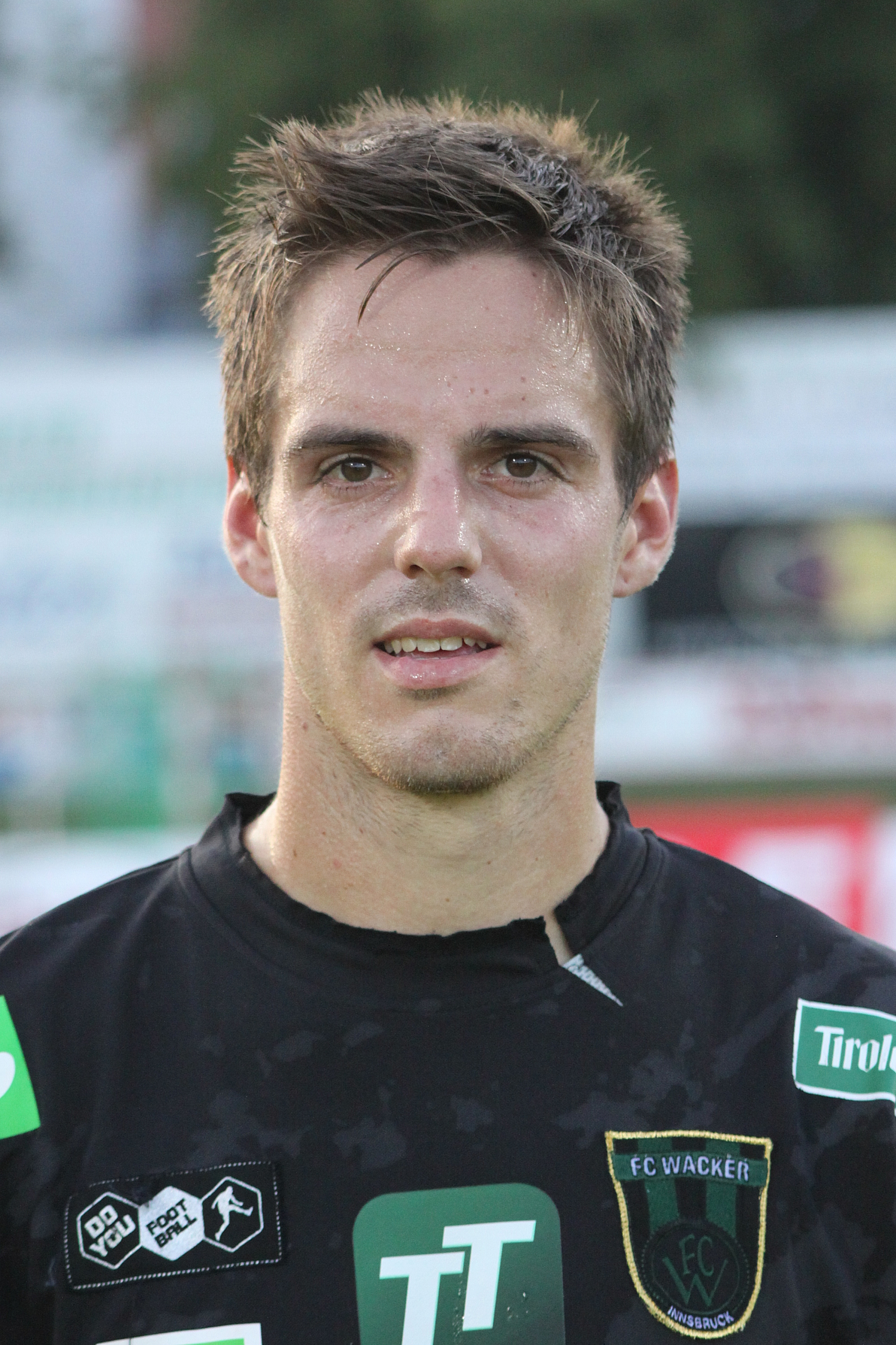 Mario Sara - FC Wacker Innsbruck (1)